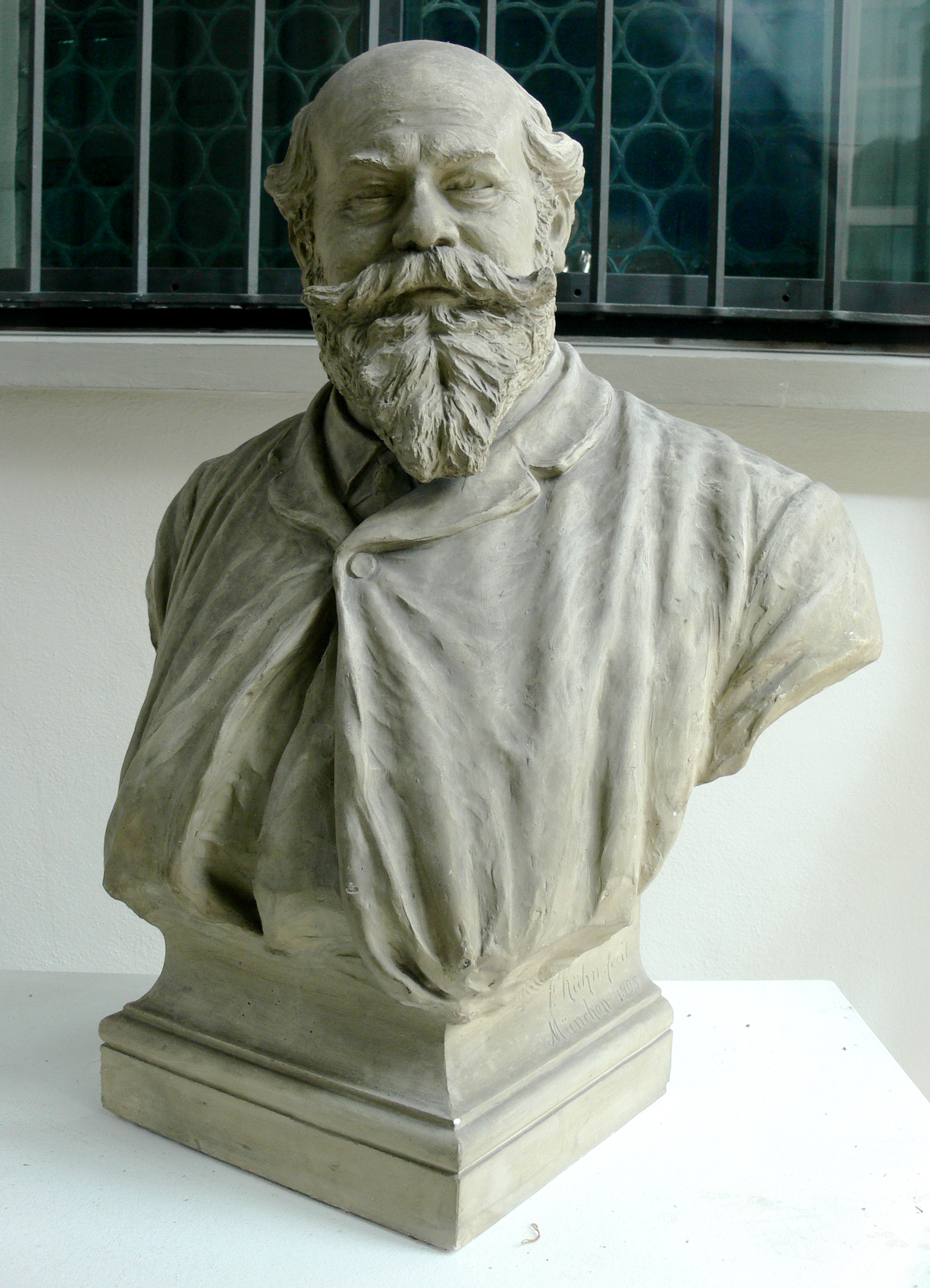 Biberach an der Riß Braith-Mali-Museum; Friedrich Kühn: Büste Anton Braith, München 1906 (entspricht der Büste am Grabmal von Braith und Mali)